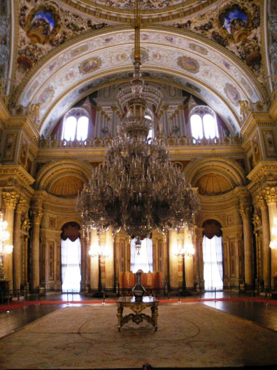 Ceremonial Hall (Muayede Salonu) in Dolmabahçe Palace